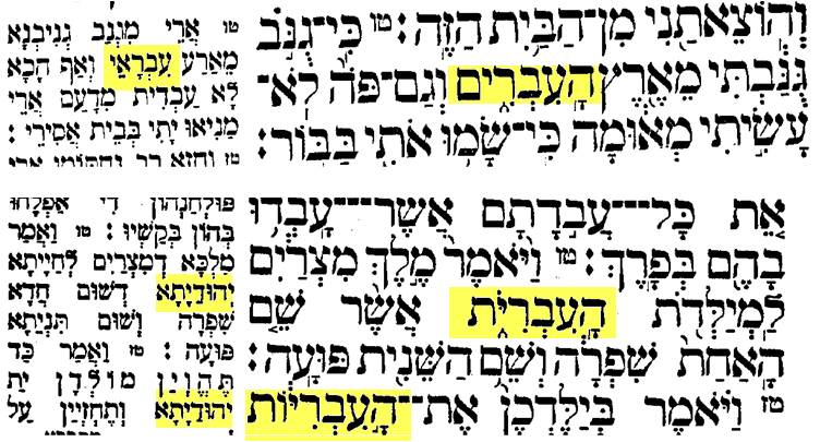 תרגום אונקלוס למונח עברי בספר בראשית ובספר שמות (עפ"י הערה של ד"ר יצחק מייטליס)